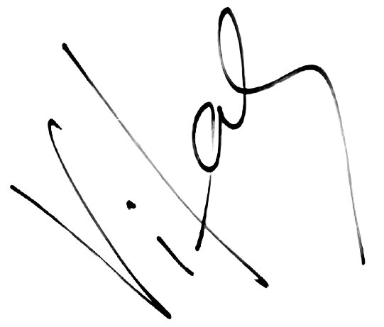 Автограф Витаса. В августе 2003 года в Сочи состоялся один из его концертов тура «Песни моей мамы». В фойе концертного зала «Фестивальный» один из торгашей за 500 ₽ продавал всем желающим постеры с автографом